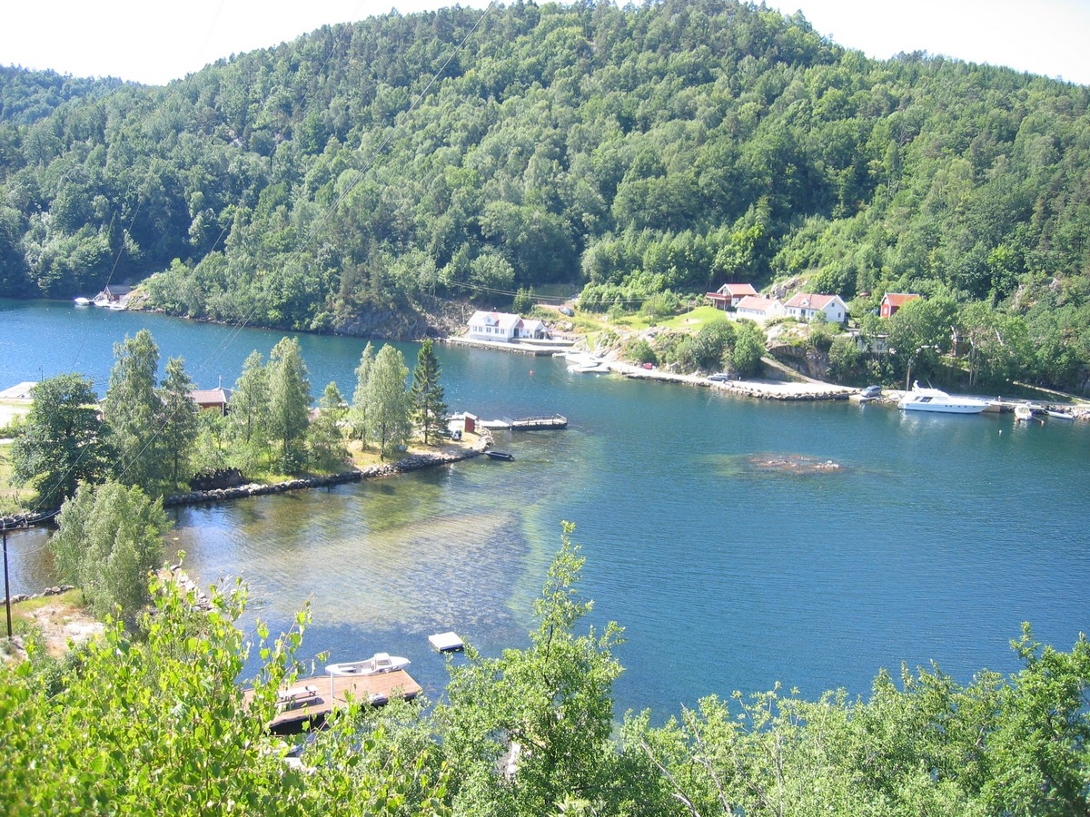 Garden Holmen ved Trysfjorden i Søgne